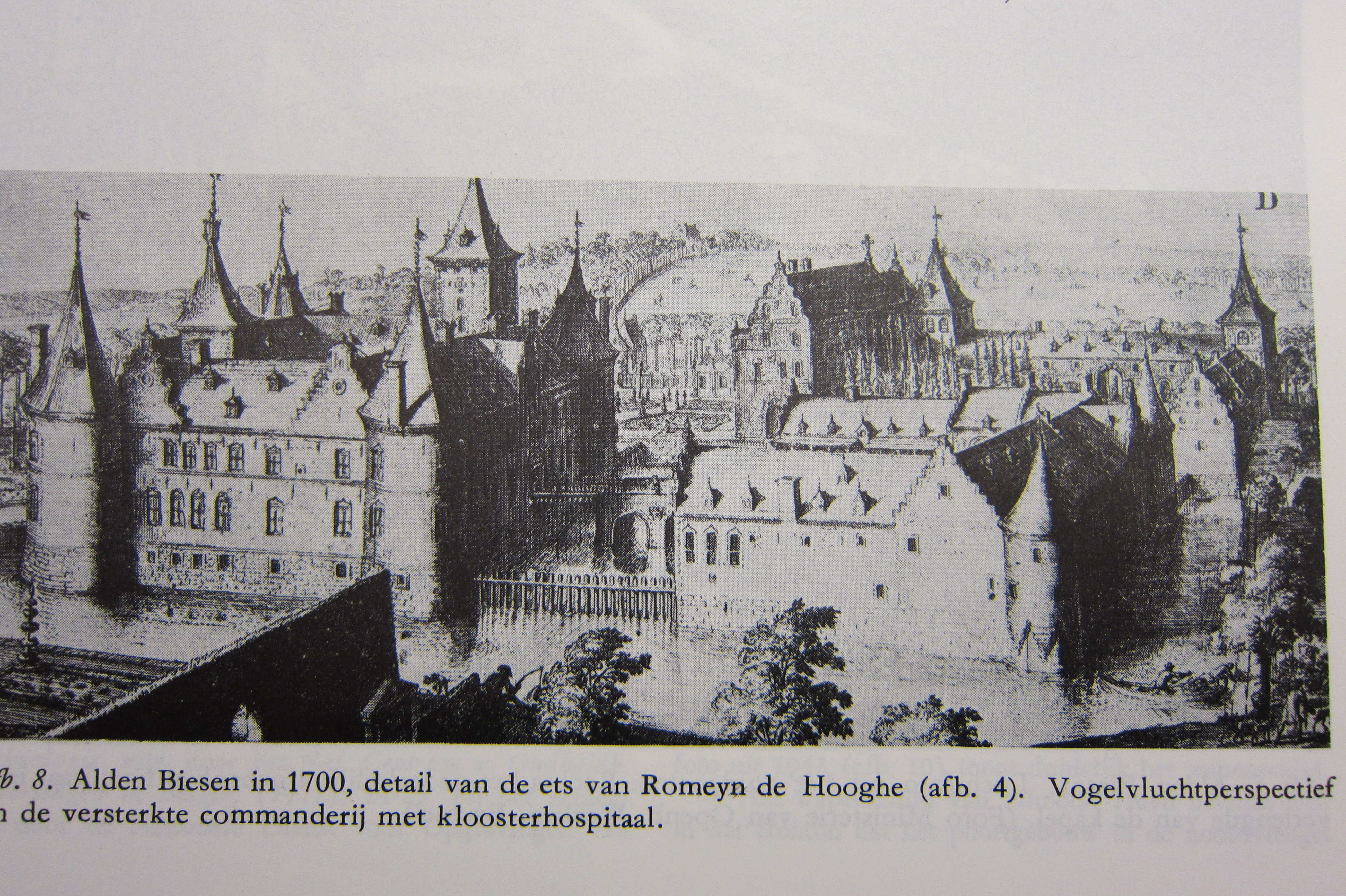 Alden Biesen in 1700, detail van de ets van Romeyn de Hooghe